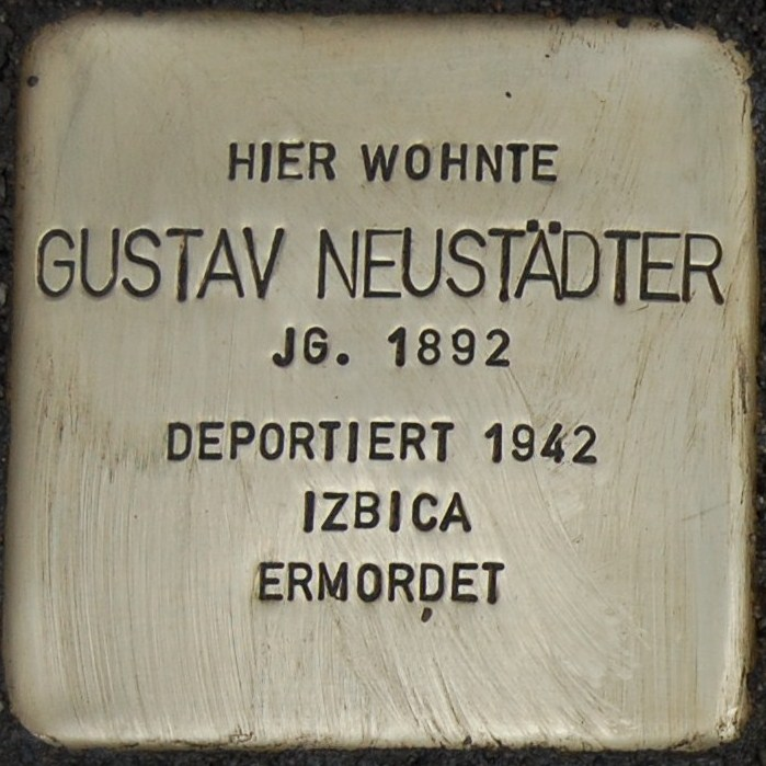 Stolperstein für Gustav Neustädter (1892-??), letzter Vorsteher der Jüdischen Gemeinde Bad Kissingen